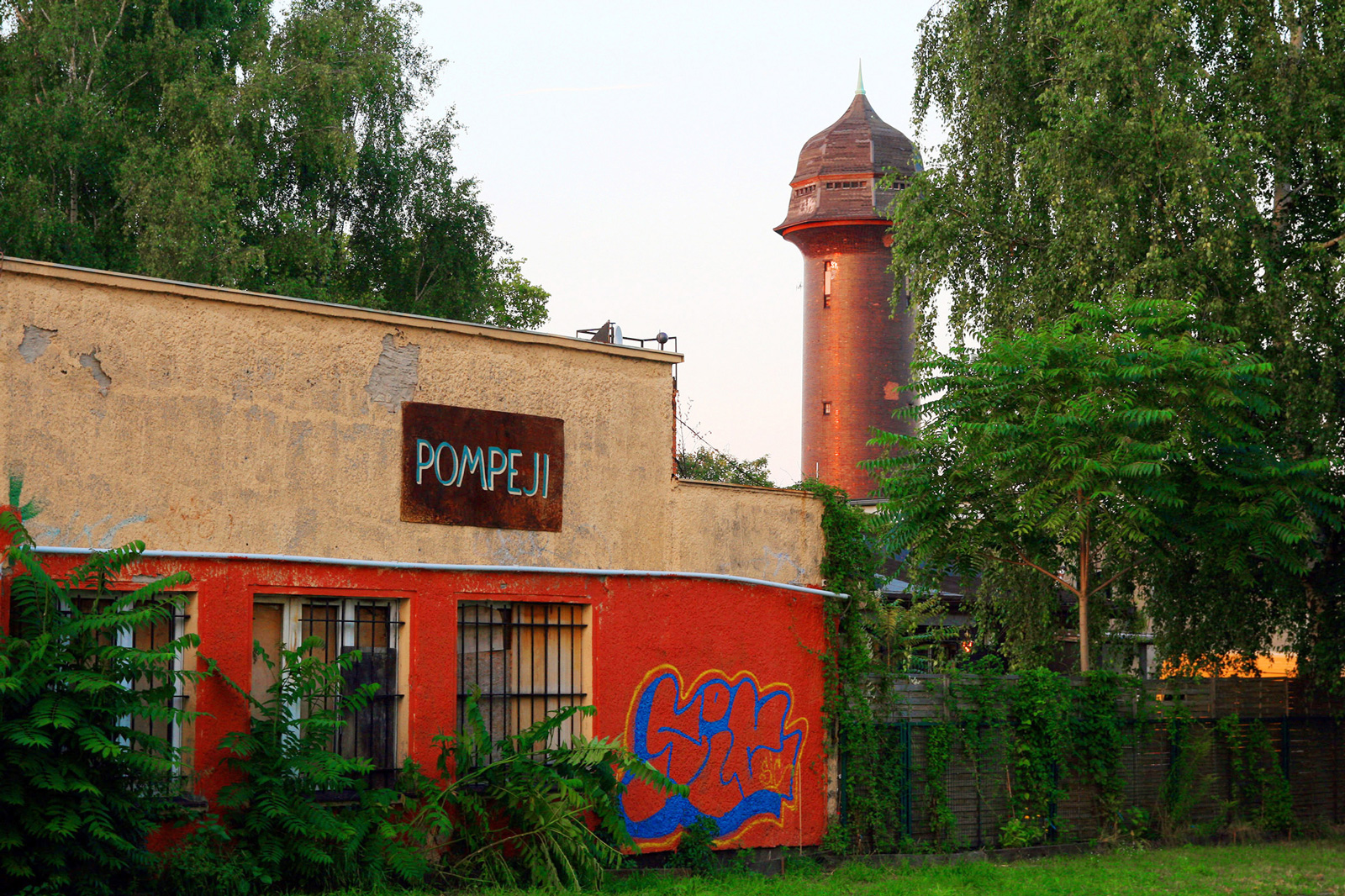 Freiluftkino Pompeji - Aussenbereich in der Laskerstraße - ZUKUNFT am Ostkreuz - August 2012